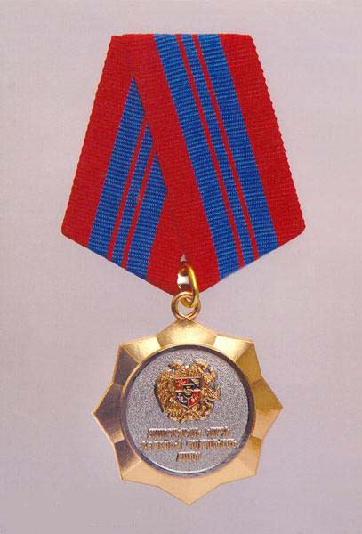 «Հասարակական կարգի գերազանց պահպանման համար» մեդալ